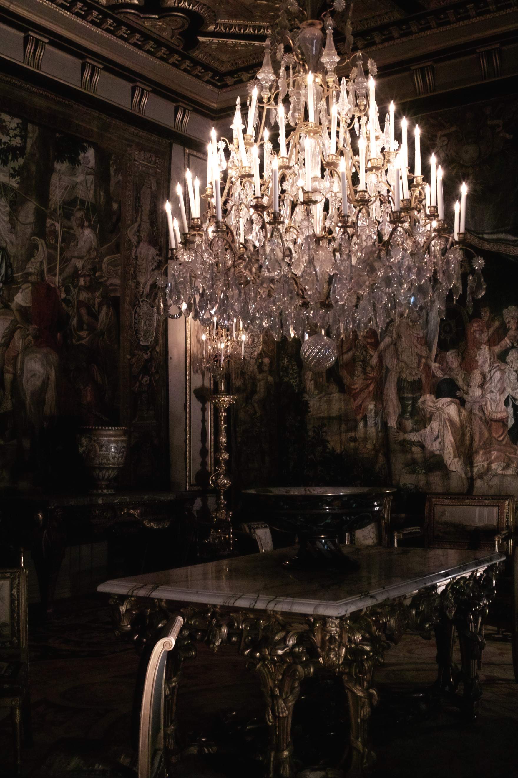 Salon der Königinmutter im Schloss Fontainebleau